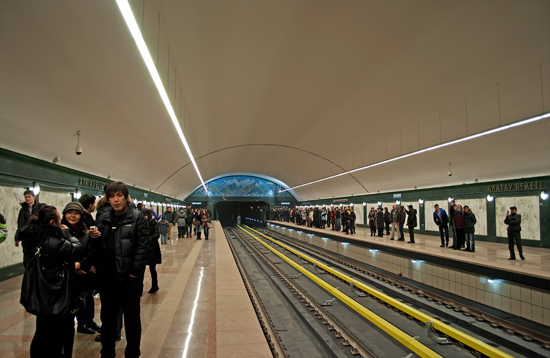 Интерьер станции алатау Алматинского метрополитена